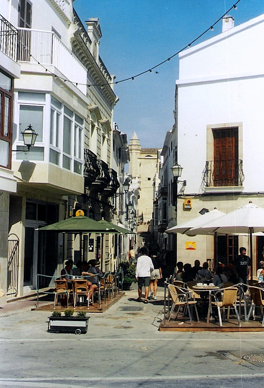 Alaior - Carrer del centre